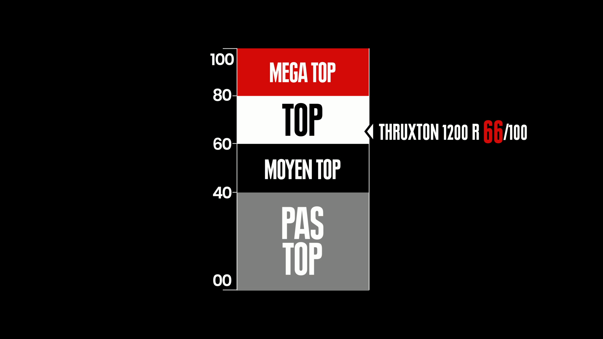 Échelle issue de l'émission High Side